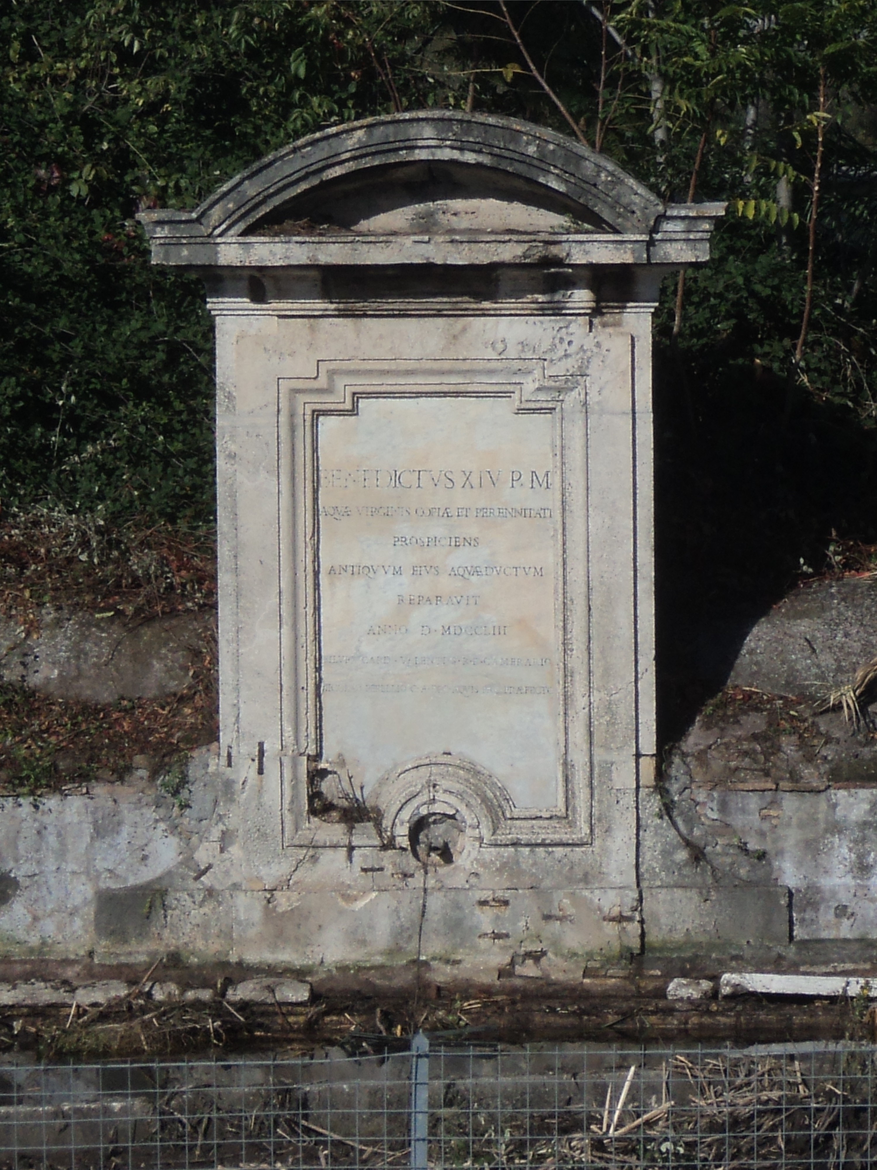 Fontanile Benedetto XIV (riparazione del 1753) lungo l'Acquedotto dell'Acqua Vergine, presso Via Collatina Vecchia. Per altre foto